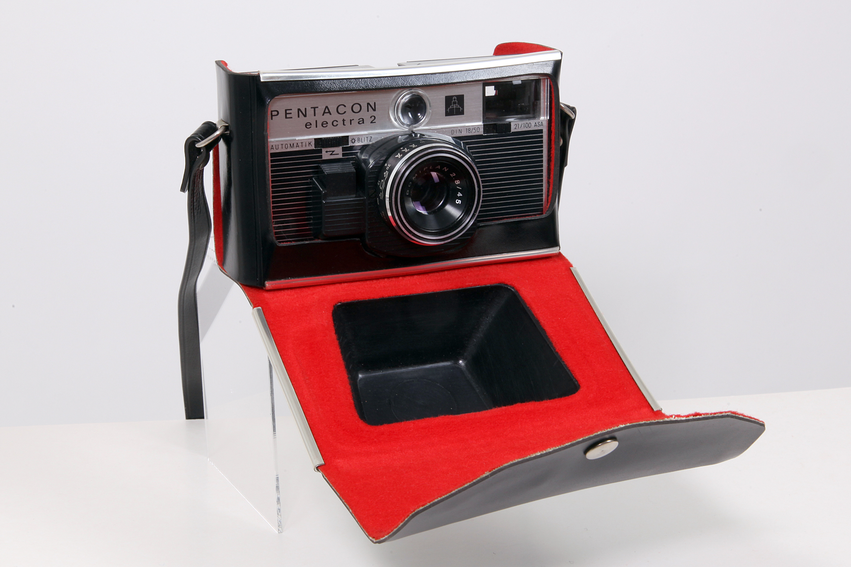 Fotoapparat Pentacon Elektra 2, aufgeklappte Bereitschaftstasche